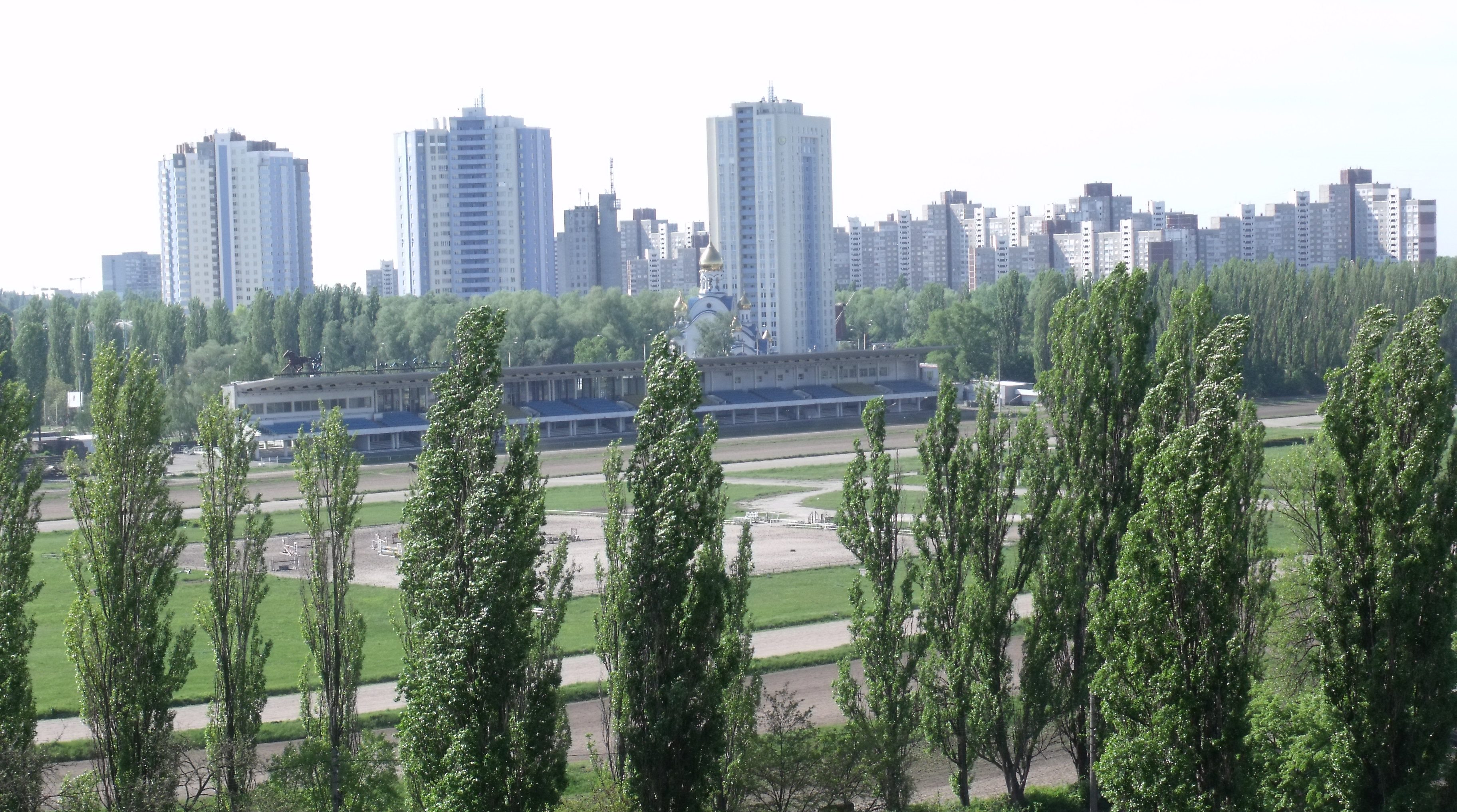 Київський іподром, Голосіївський район, Теремки, 2016 р.